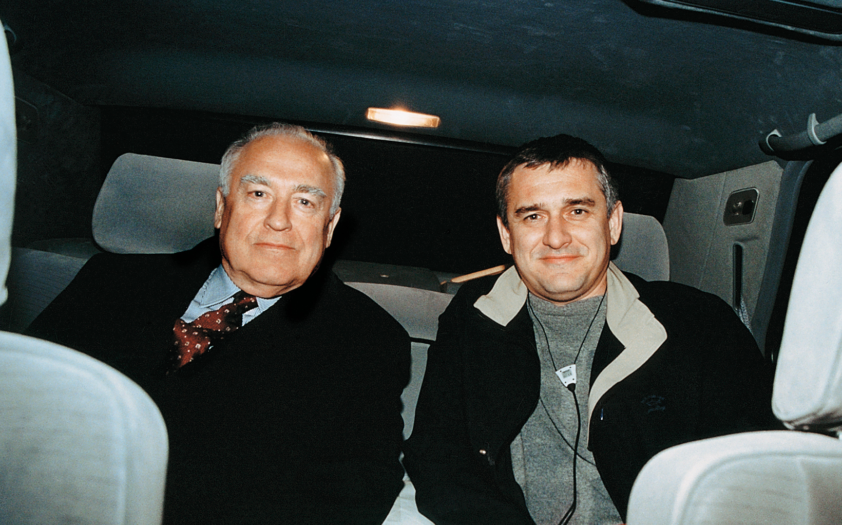 2003 г. Виктор Степанович Черномырдин со старшим сыном Виталием Викторовичем